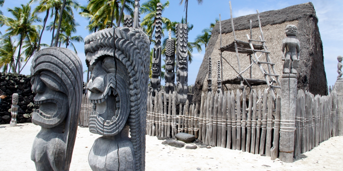 Иллюстрация для викиучебника Гавайеведение